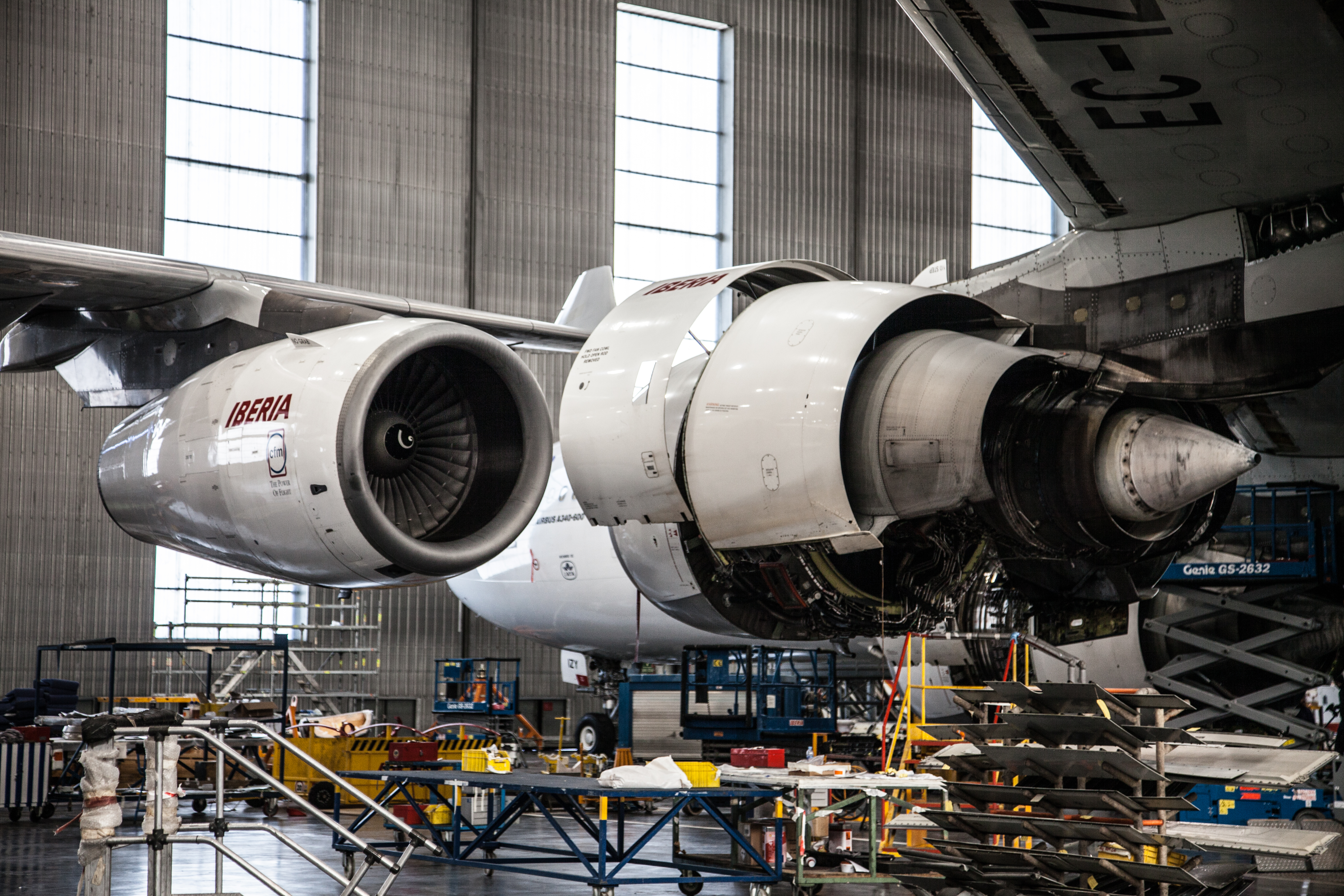 Iberia, La Muñoza-Madrid